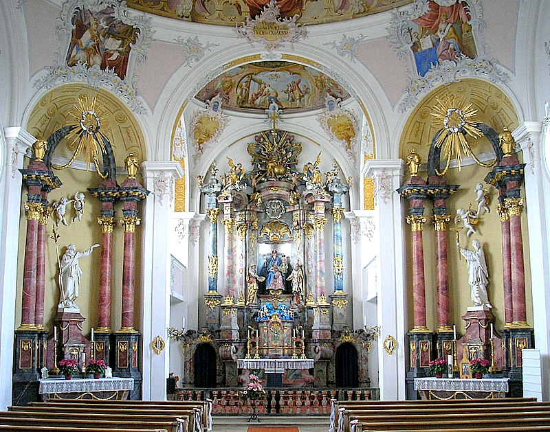 Wallfahrtskirche zu Unserer Lieben Frau (Bobingen, Landkreis Augsburg, Bayerisch-Schwaben). Innenraum nach Osten. Eigene Aufnahme, Okt. 2007 / Pilgrimage church of Our Lady (Bobingen near Augsburg, Bavaria, Germany). Interior, looking east.